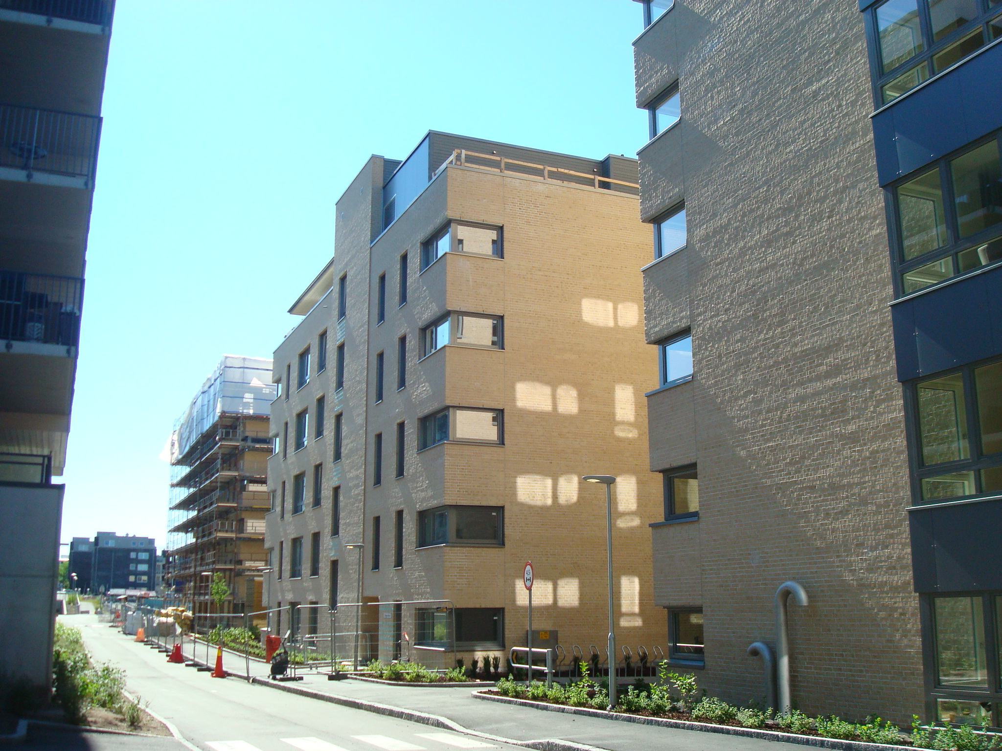 Ullagerveien (blokkene i nr. 1,3 og7) på Løren i Oslo.